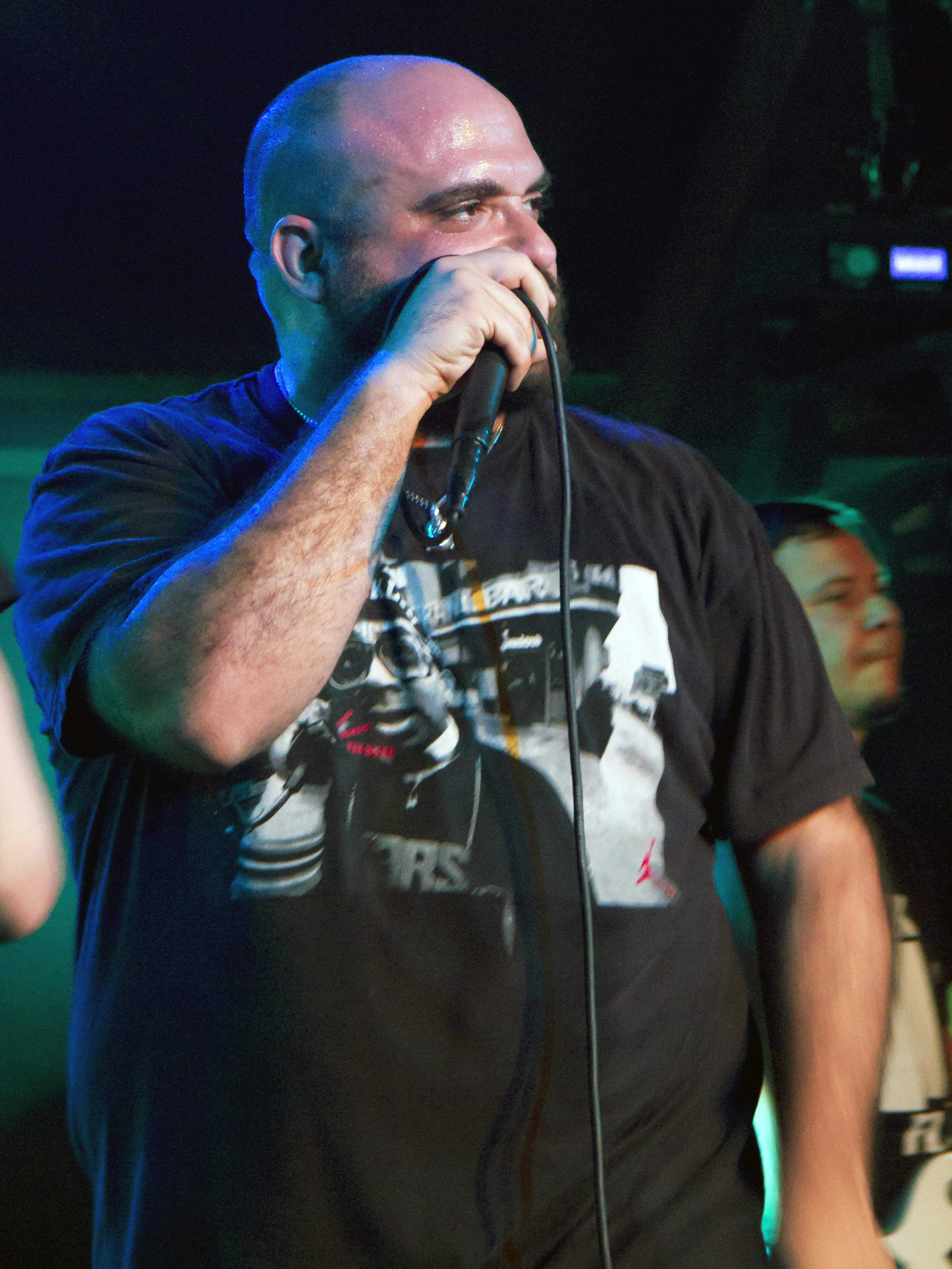 Nitto (Firenze, Auditorium Flog)